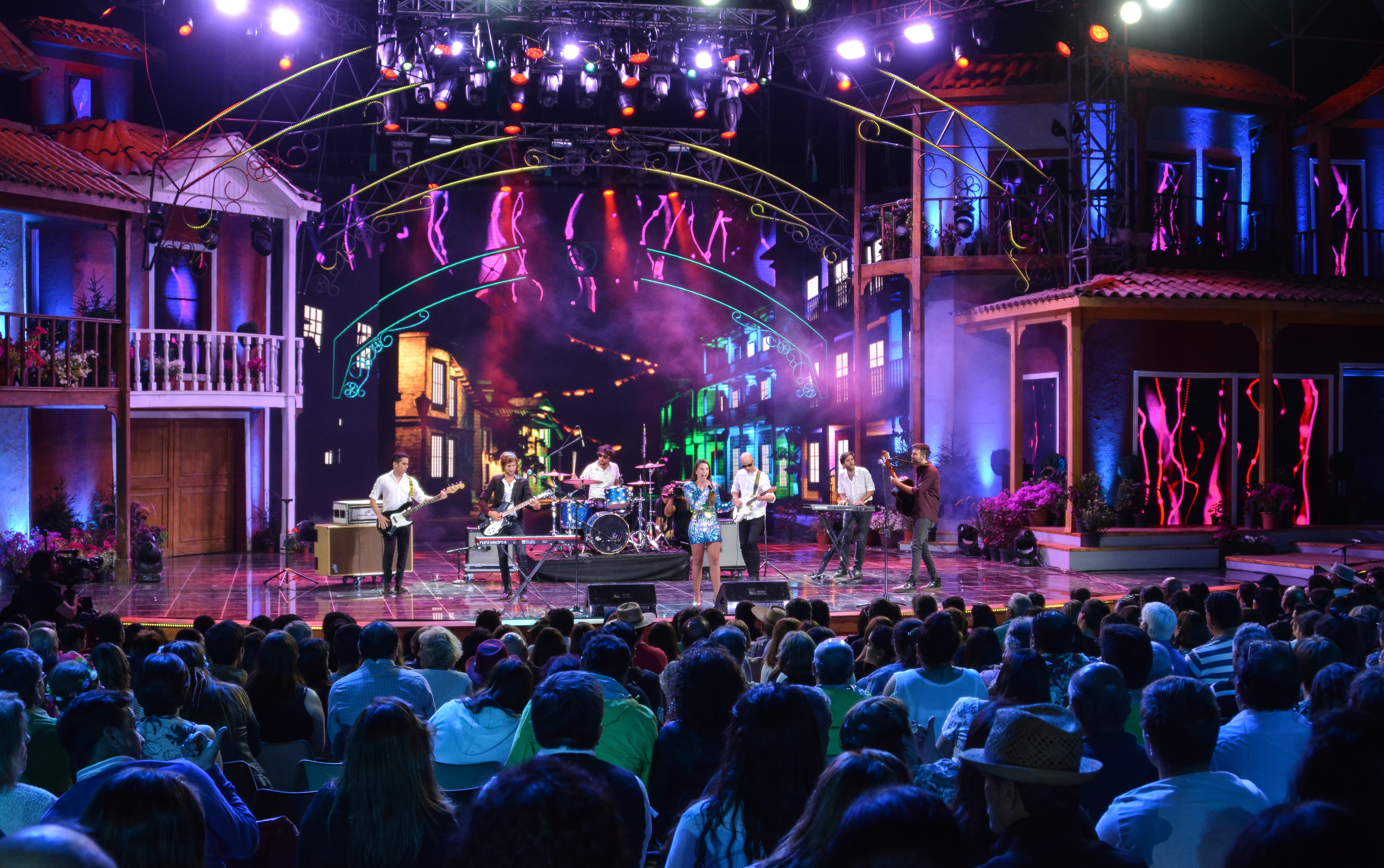 Obertura del Festival del Huaso de Olmué 2018, Chile.